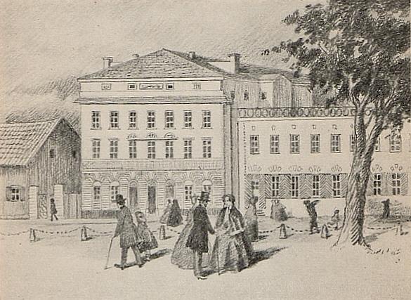 Mindre teatern, Östra trädgårdsgatan, Stockholm. Omkring 1850